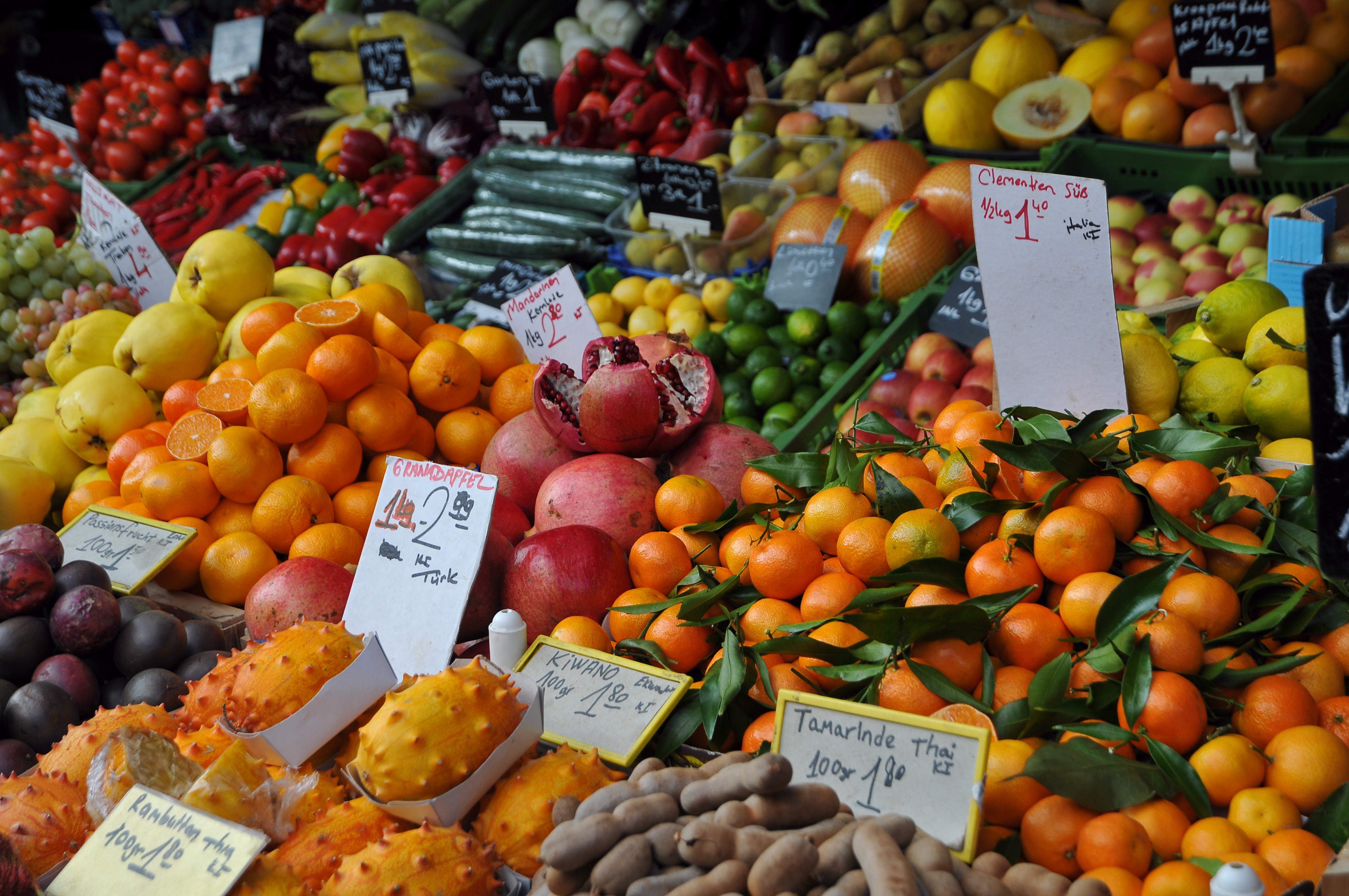 Der Naschmarkt im 6. Wiener Gemeindebezirk, ist mit 2,315 Hektar der größte innerstädtische Markt der Stadt. Er liegt zwischen der Linken Wienzeile und der Rechten Wienzeile auf dem hier eingewölbten Wienfluss.